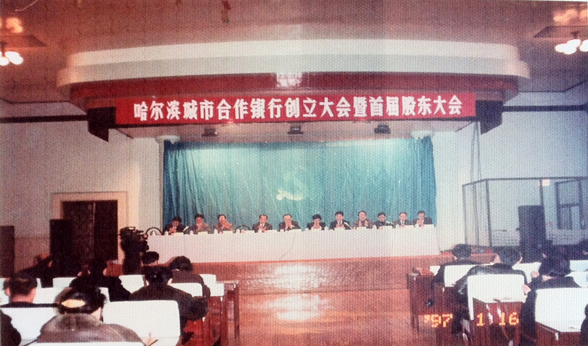 中文（中国大陆）: 哈尔滨城市合作银行创立大会